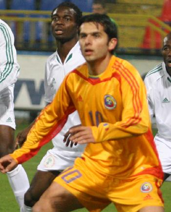 Jucătorul de fotbal Nicolae Dică, jucând pentru naționala României, împotriva naționalei Nigeriei